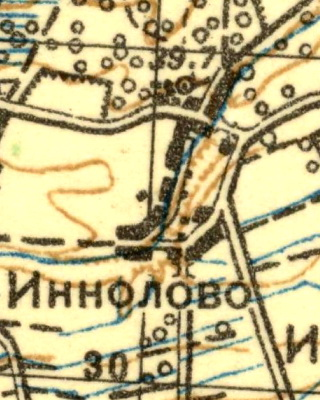 Топографическая карта Ленинградской области, квадрат О-35-12-Г (Ропша), деревня Иннолово